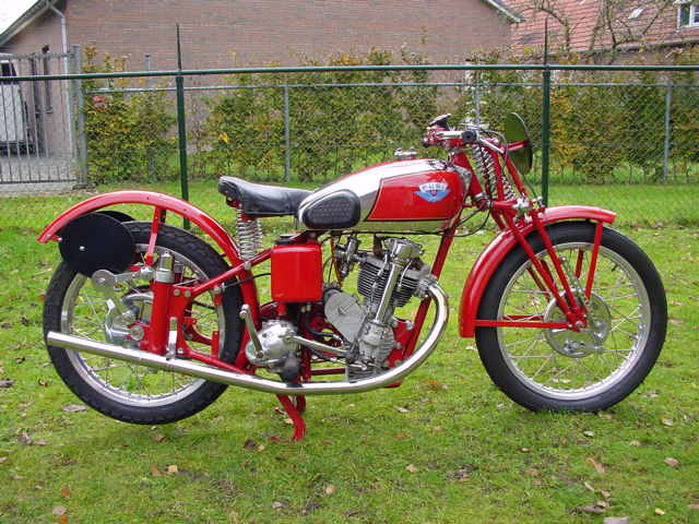 Toestemming van Yesterdays Antique Motorcycles (